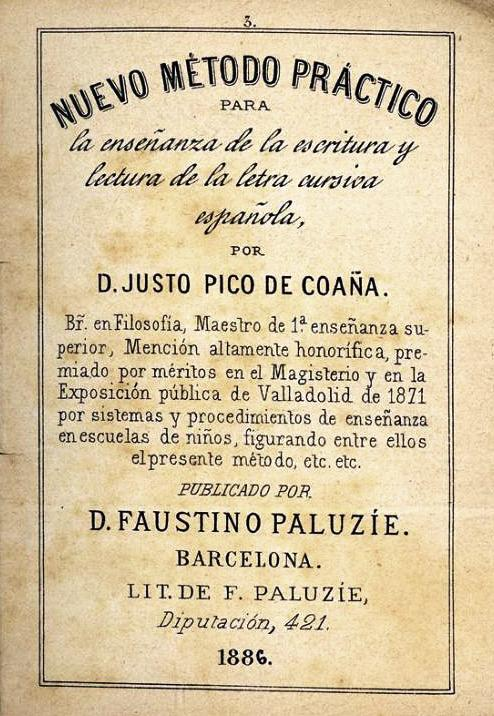 Nuevo método práctico para la enseñanza de la escritura y lectura de la letra cursiva española